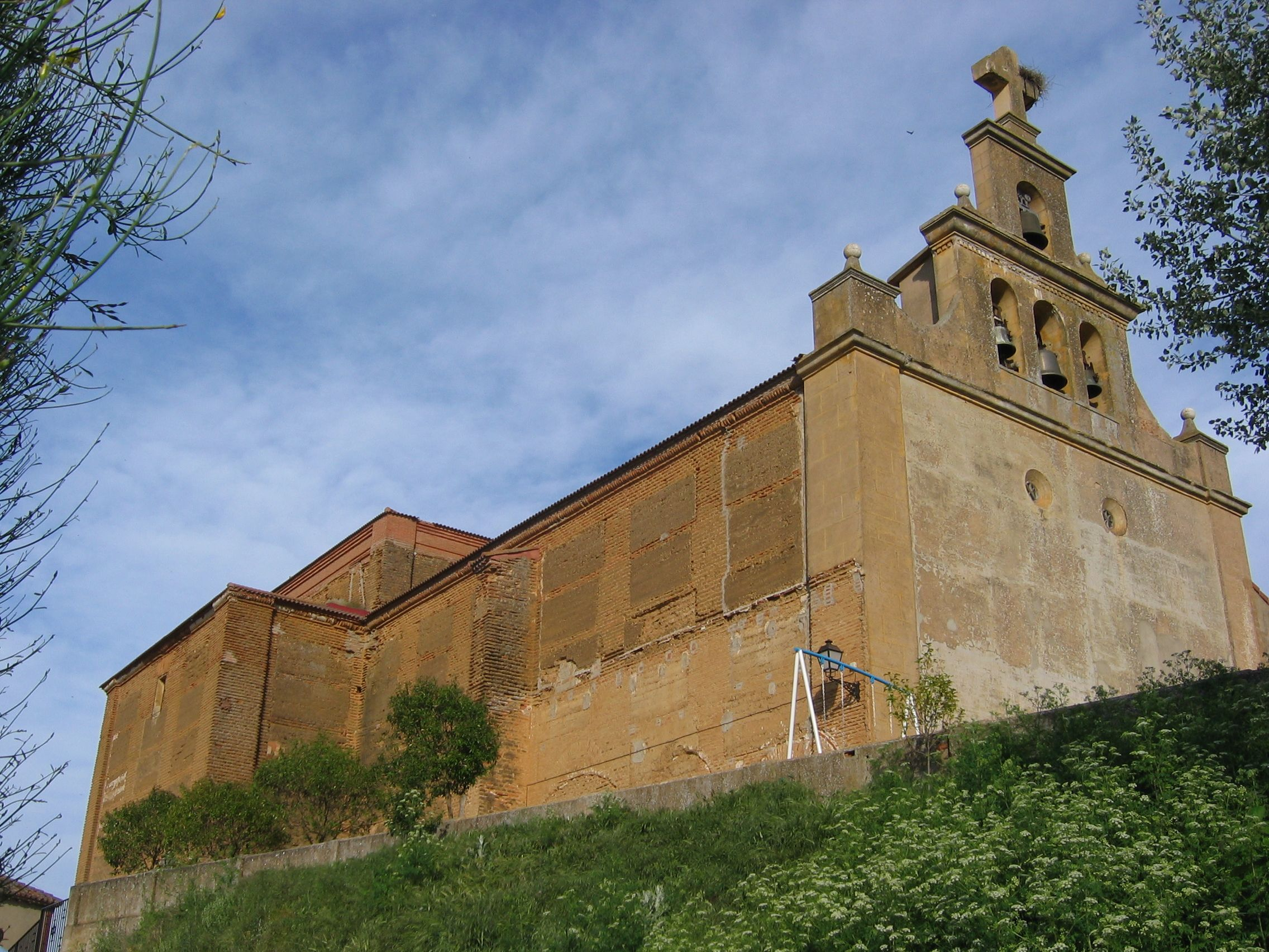 Iglesia de Abia de las Torres (Palencia, Castilla-León).